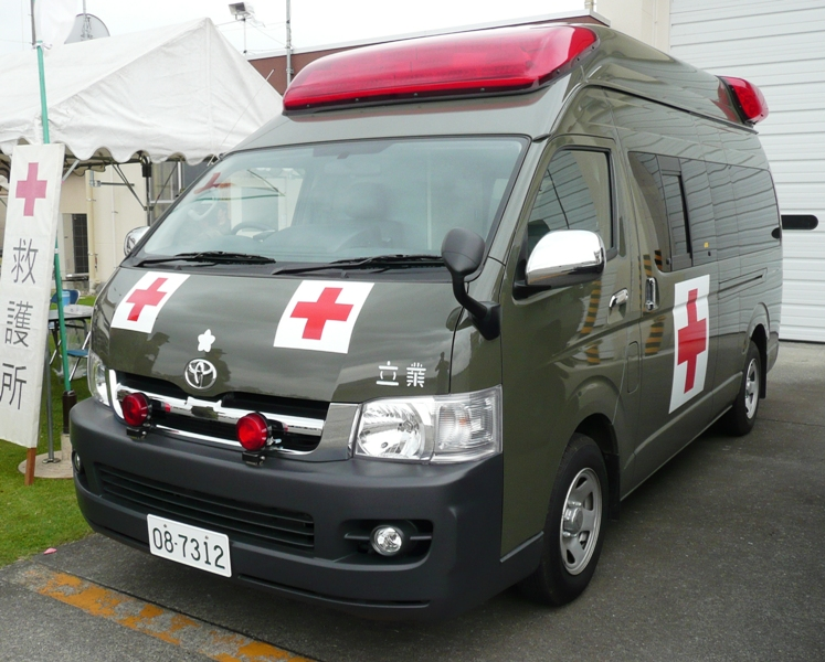 陸上自衛隊の救急車。立川防災航空祭にて。（自衛隊用はハイメディックではなくトヨタ救急車がベースになっています）